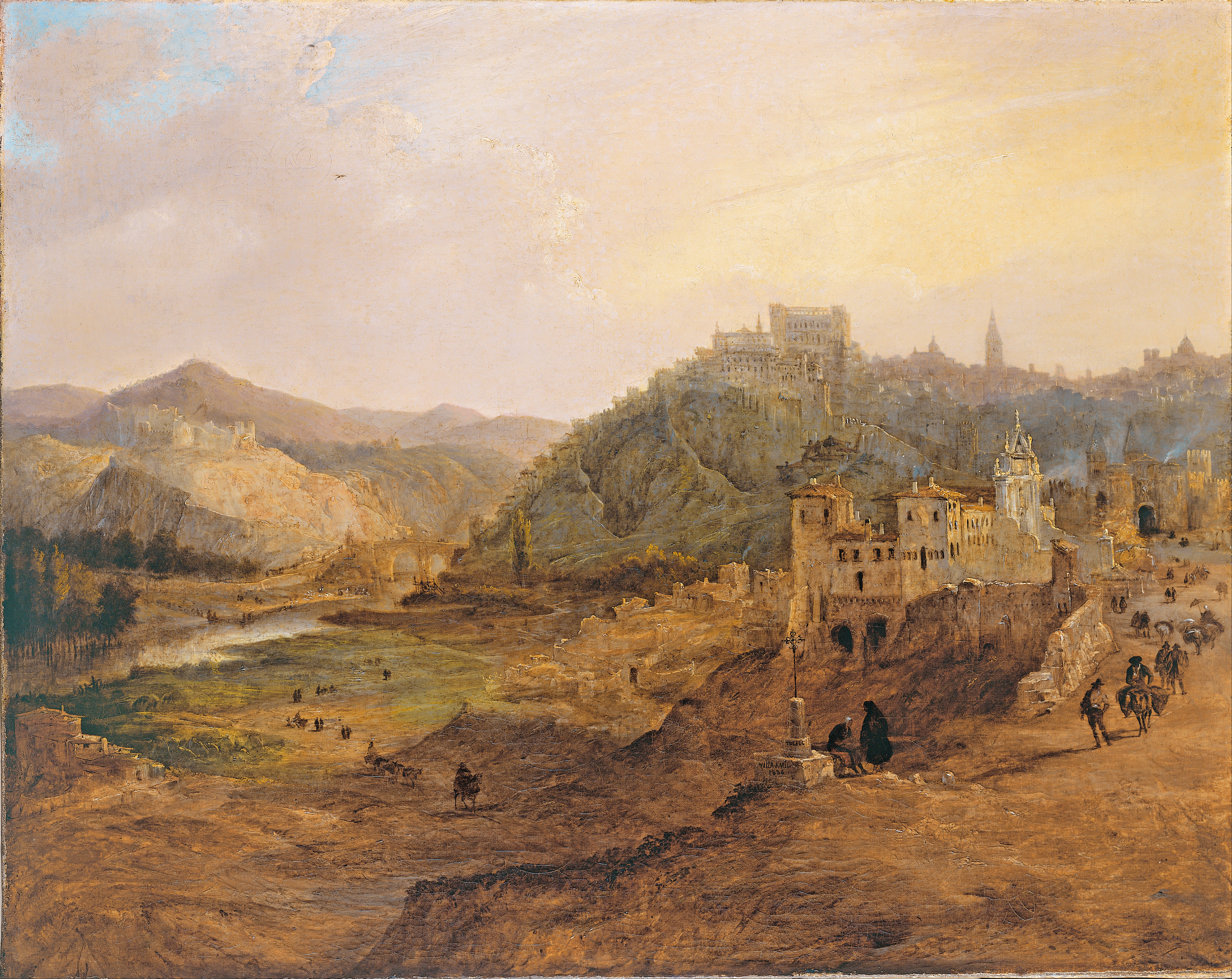 El lienzo representa la ciudad española de Toledo vista desde la conocida como Cruz de los Canónigos, y fue pintado en 1836.